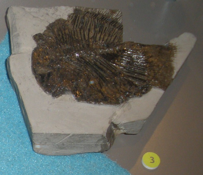 Fossil of Lepidotes, an extinct fish Took the photo at Musee d'Histoire Naturelle, Brussels